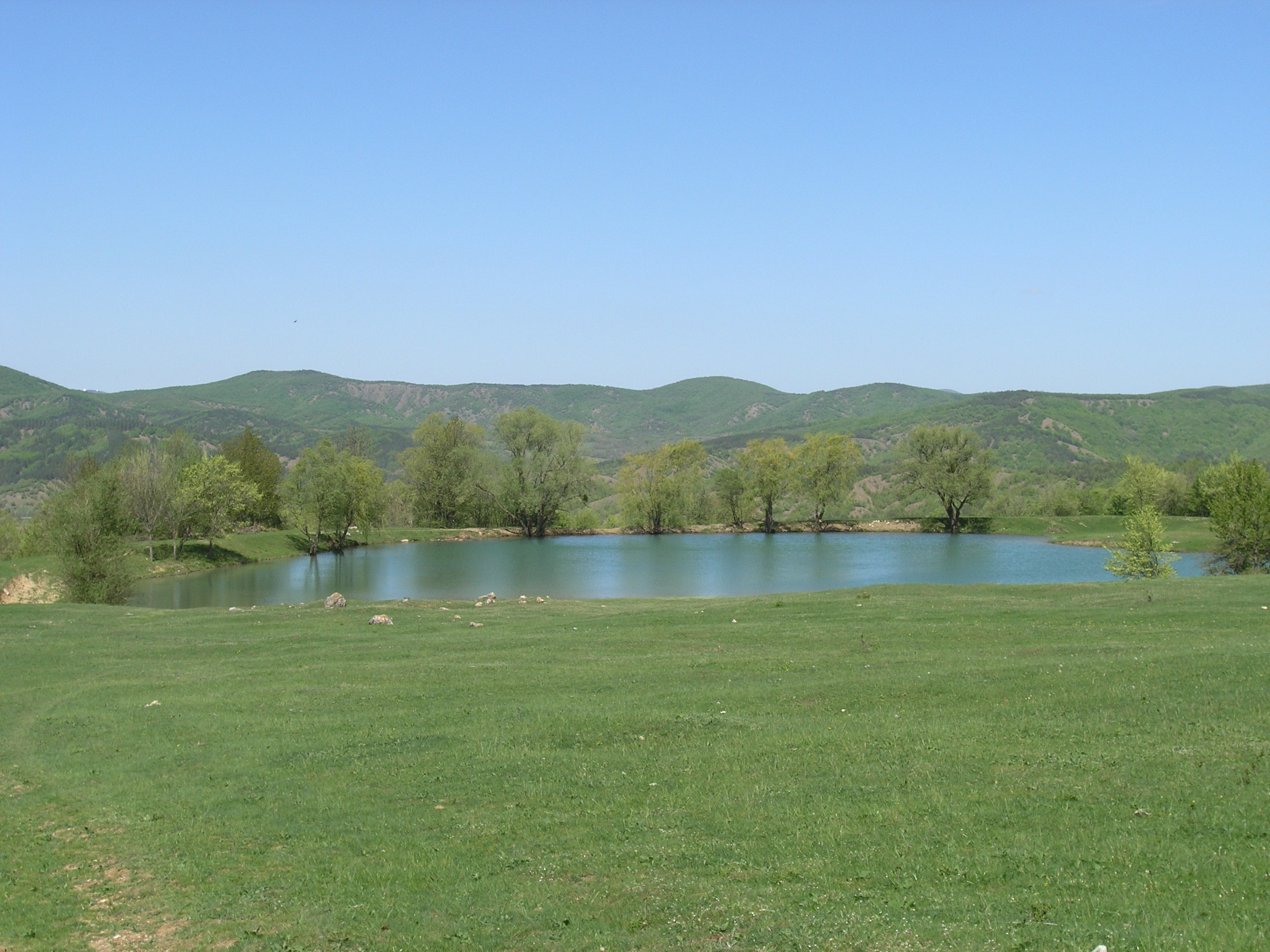 Пруд в овраге Йол, Крым.